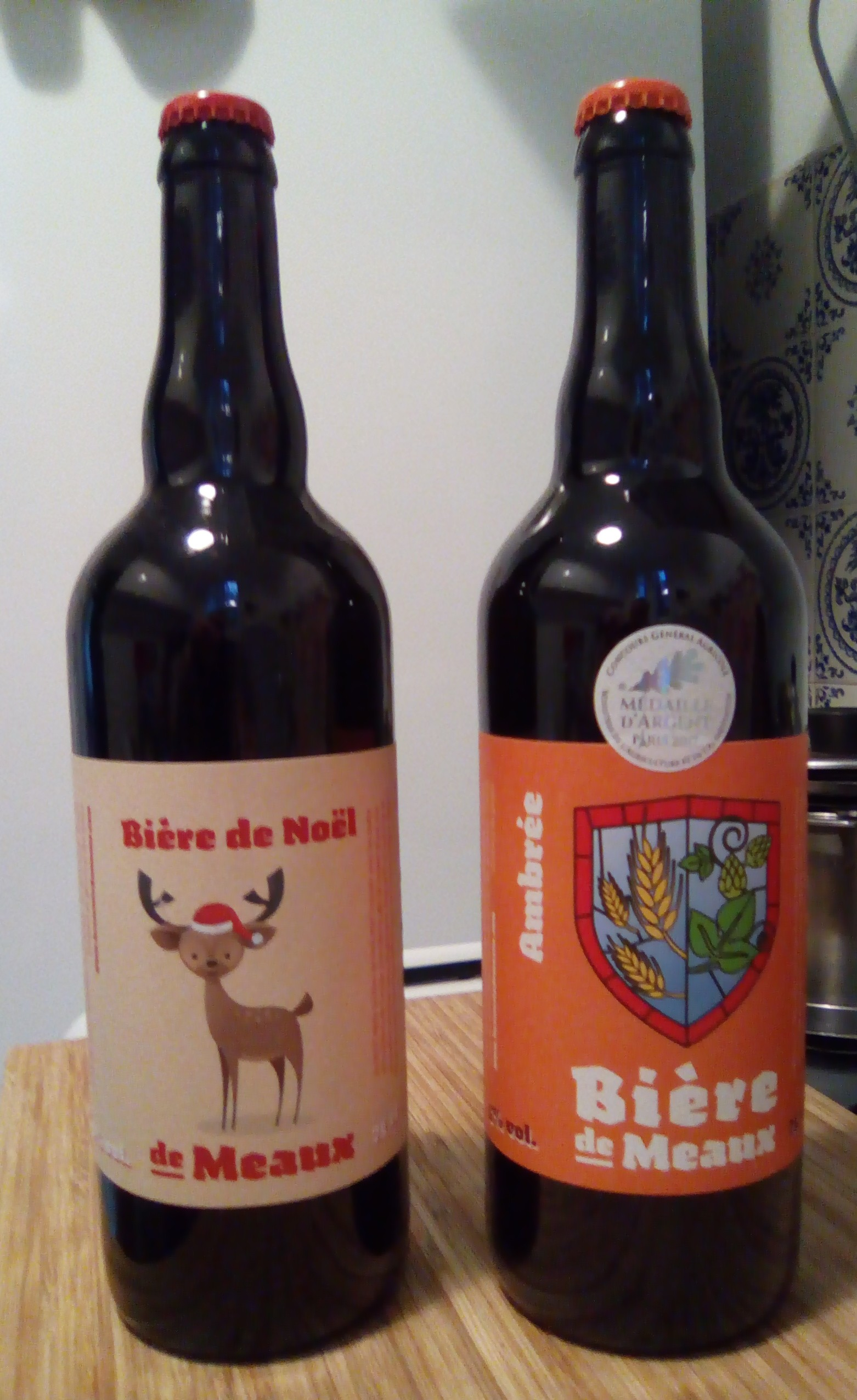 Bouteilles de "Bière de Meaux".